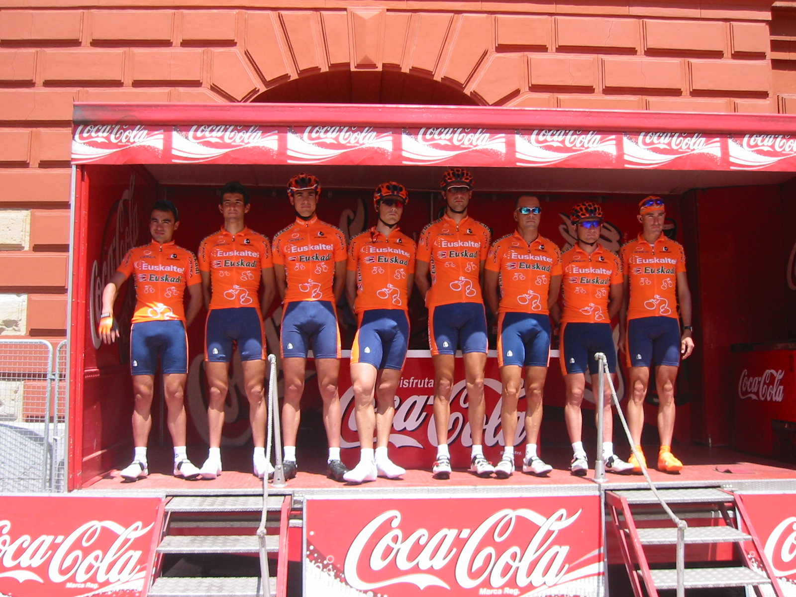 Euskaltel-Euskadi, Euskal Bizikleta 2005